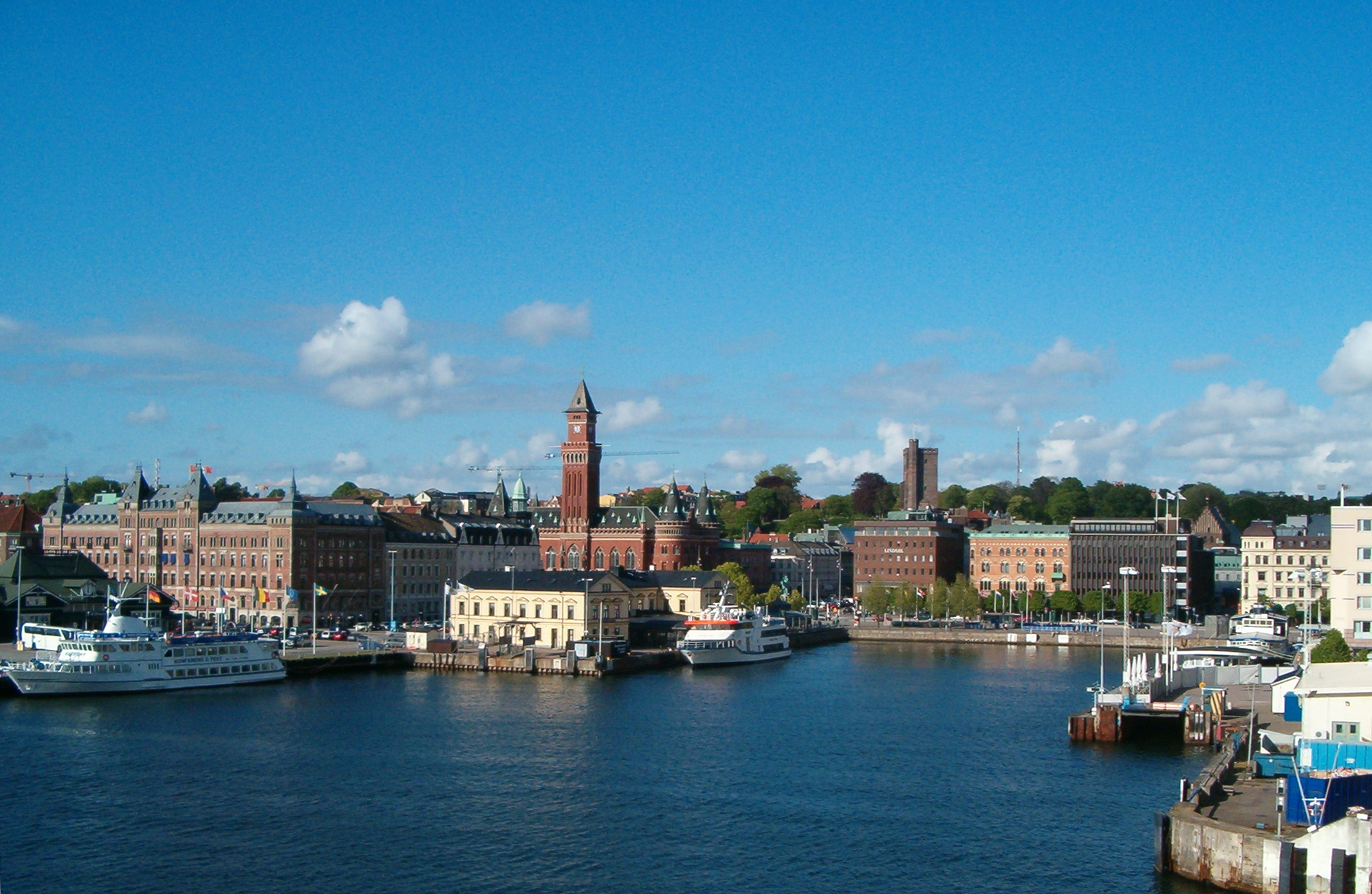 Helsingborg och Inre hamnen, sedd från en Scandlines-färja.